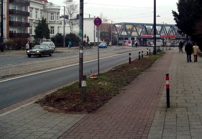 Eisenbahnunterführung der Schwachhauser Heerstraße in Bremen. Bildrichtung ist Südwest. Zwecks Straßenverbreiterung waren in der Nacht zuvor ein Duzend Bäume gefällt worden (Kerzen auf den Baumstümpfen im Vordergrund, rechts). Müll im Vordergrund wegretouchiert und Bild aufgehellt.